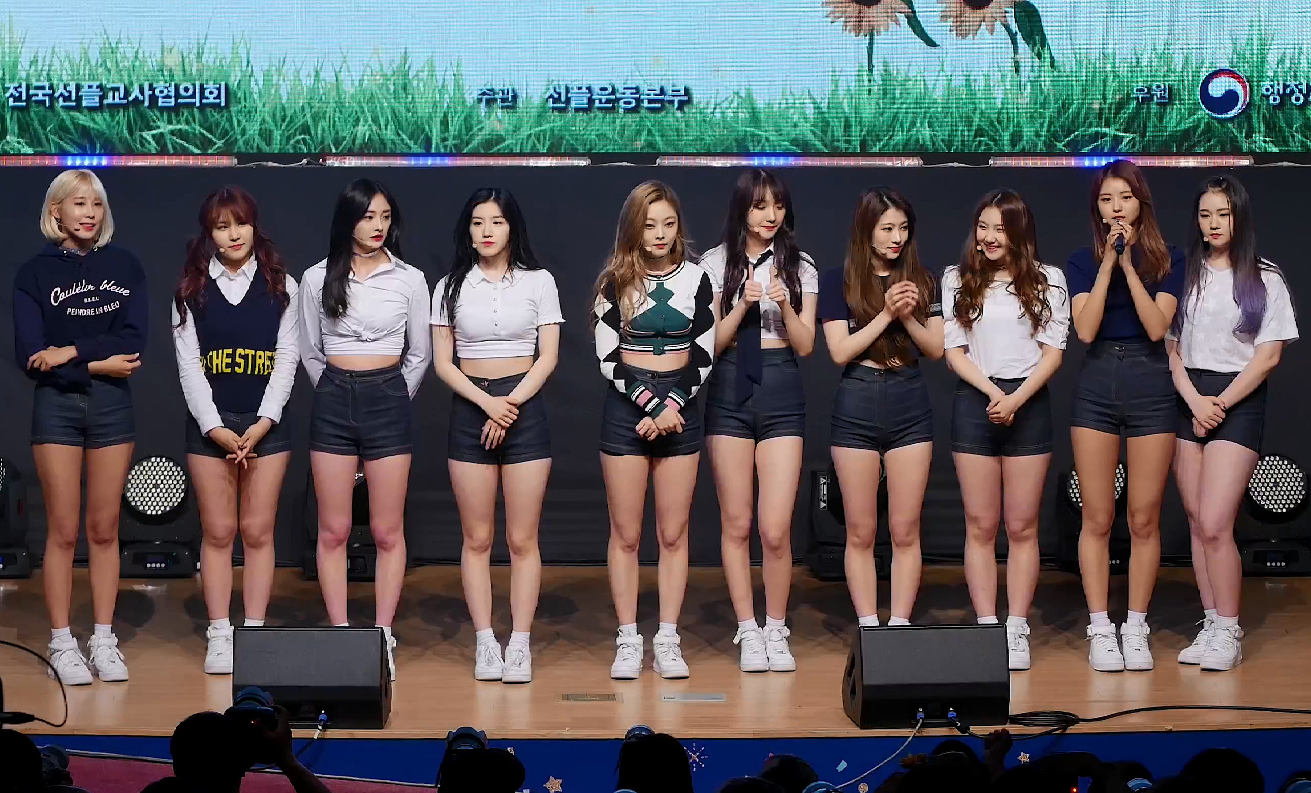 170530 선플 콘서트 - 프리스틴 'WEE WOO' 4K 직캠 by DaftTaengk